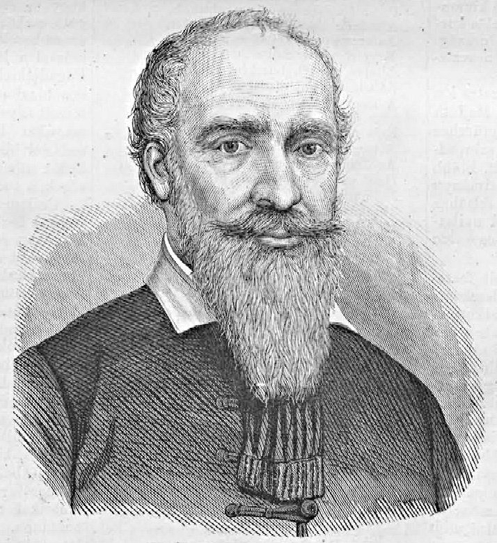 Perényi Zsigmond (1783–1849) politikus, az 1848–49-es szabadságharc vértanúja